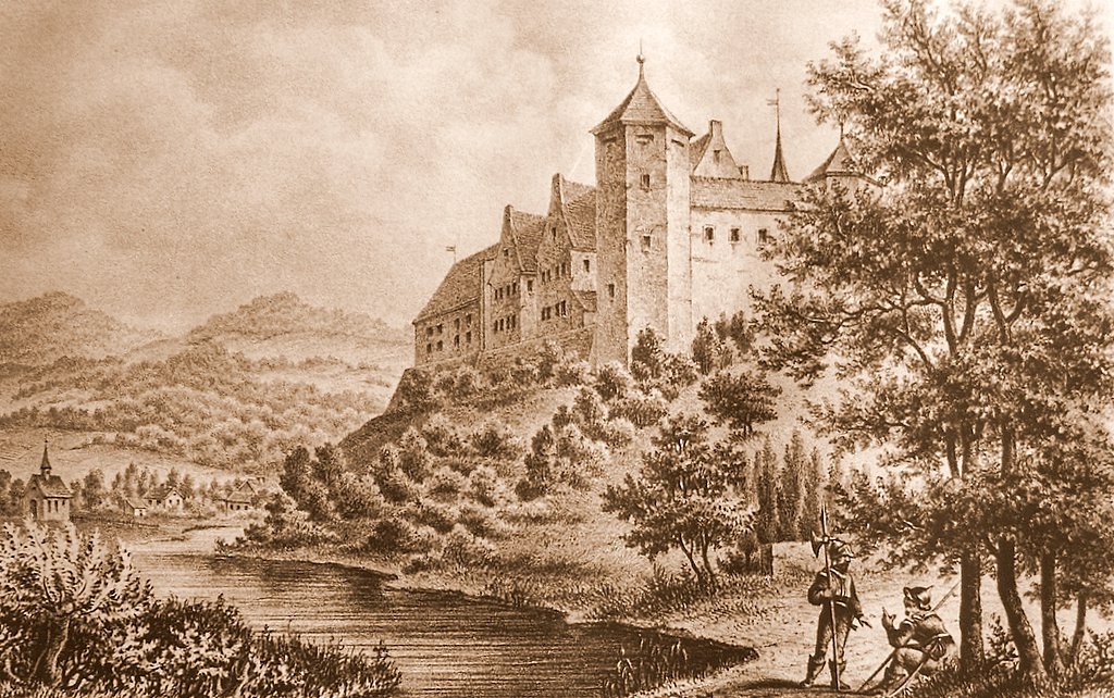 Burg Jagsthausen 1807. Radierung